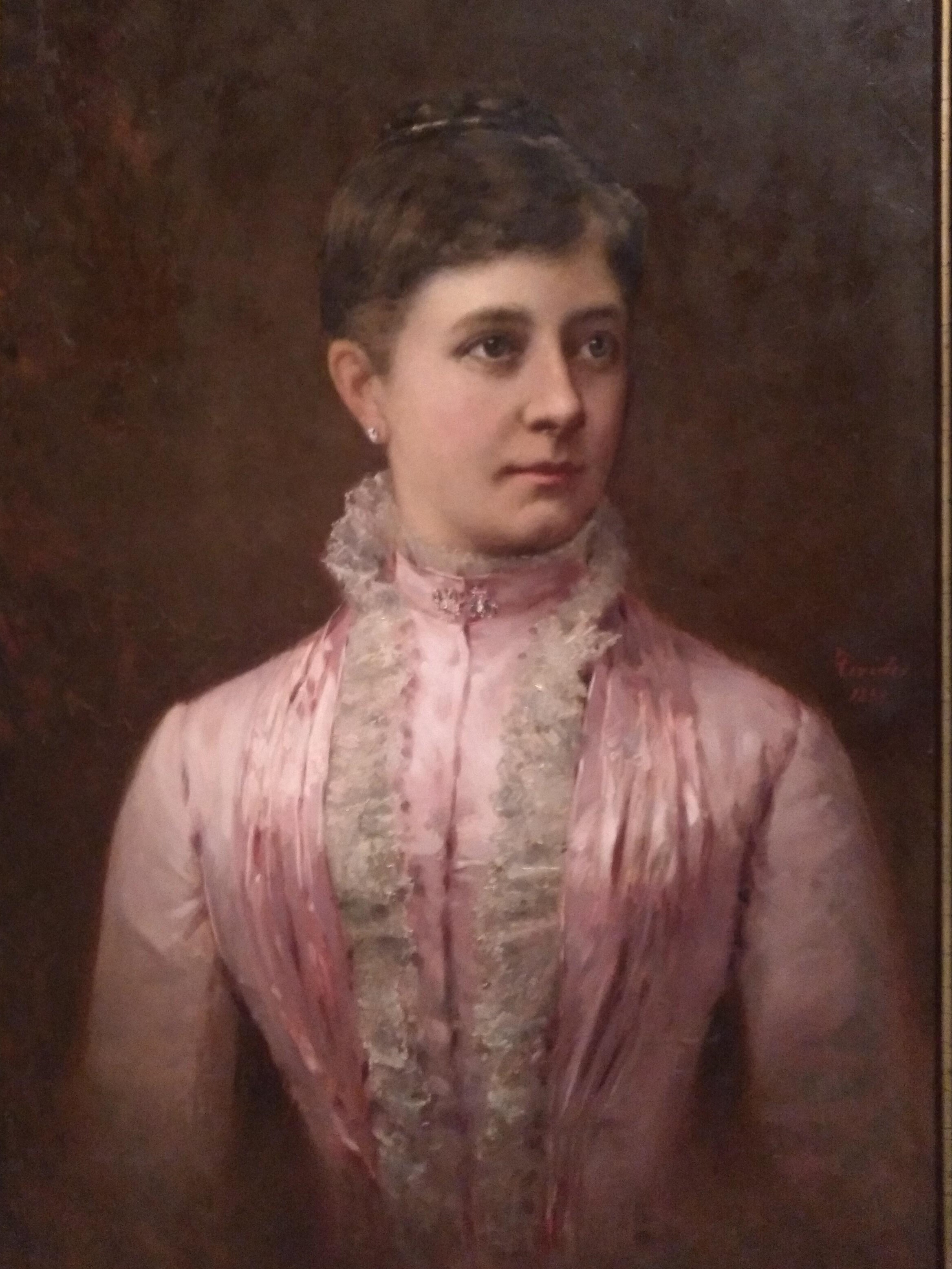 Josefa Teixidor margolariaren erretratua Modest Teixidorrek egina, olio-pintura taula gainean, 1889koa. Bartzelonan dagoen Kataluniako Arte Museo Nazionalan gordetzen da.